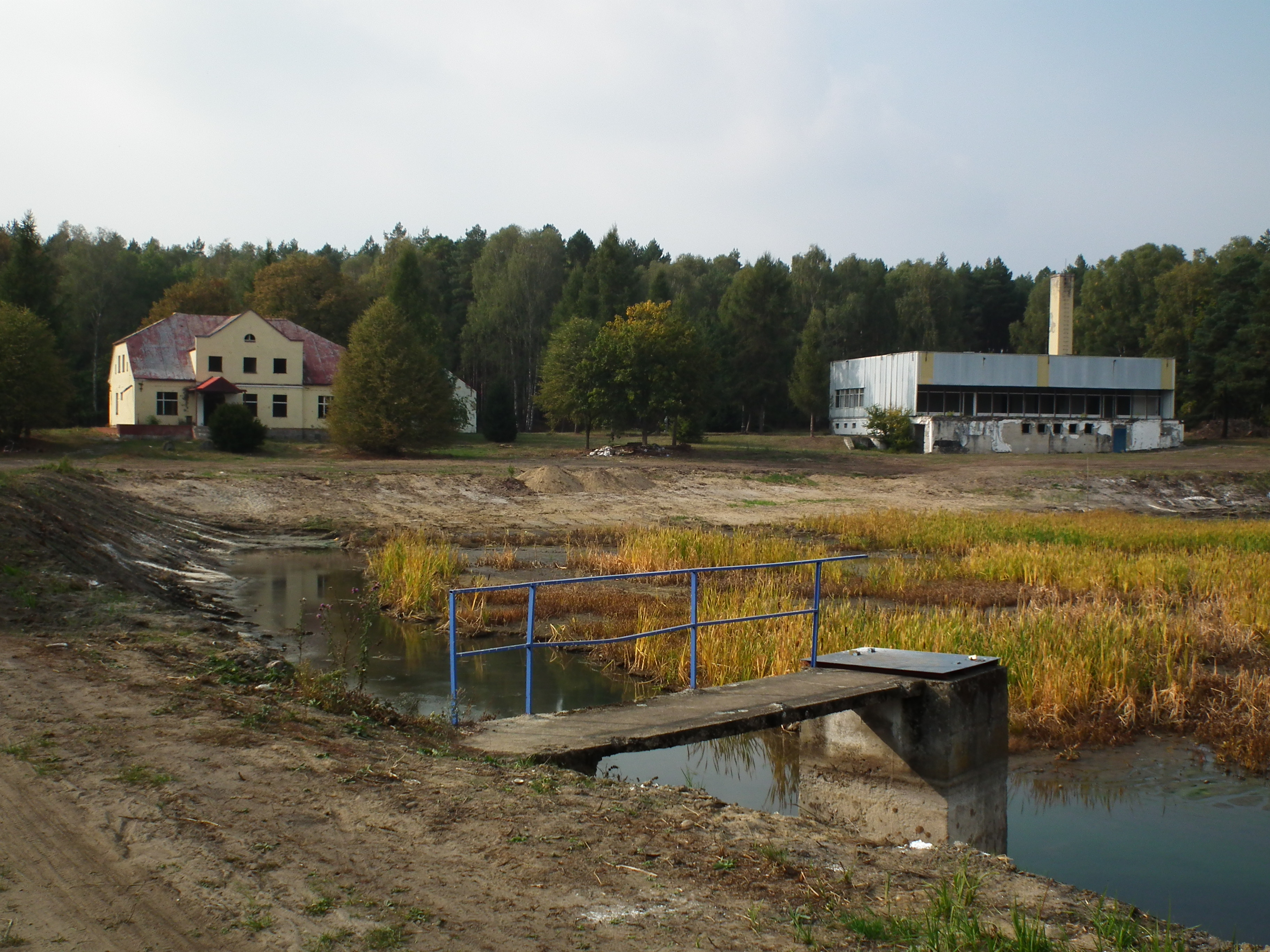 Piłka-Młyn. Ruiny osady.